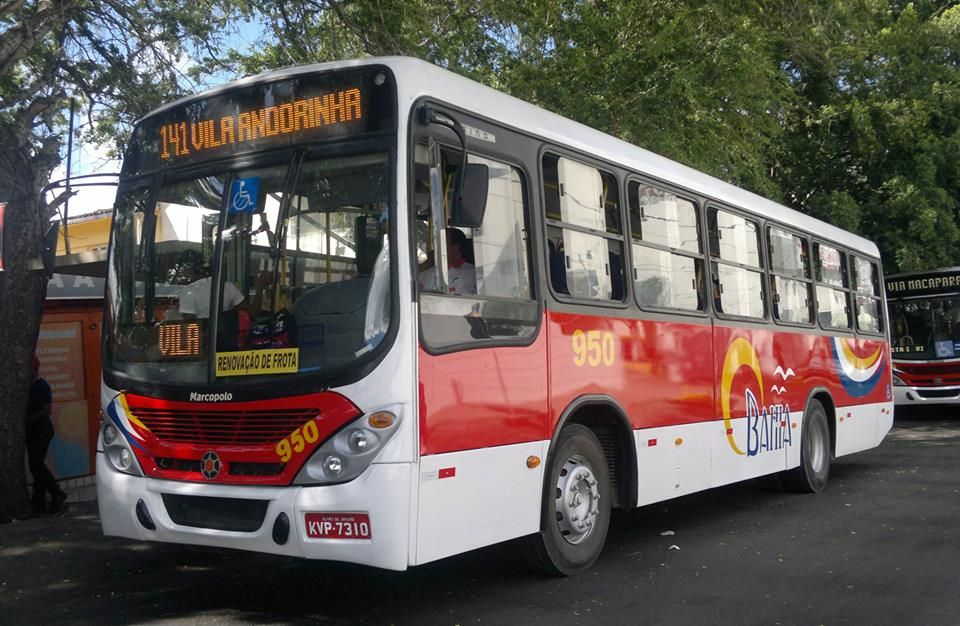 Transporte urbano de Caruaru, Pernambuco